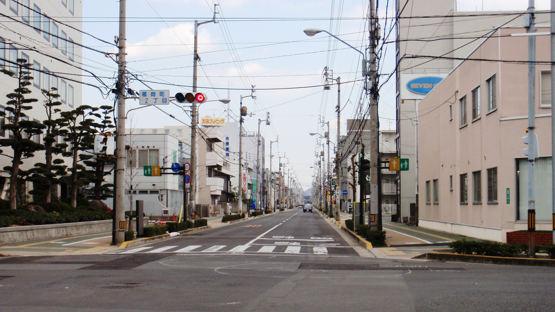 香川県高松市の市道片原町沖松島線の風景。市道朝日町仏生山線の交点から東を見る。